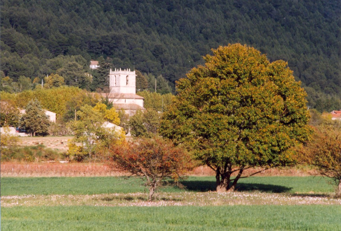 Eglise de Signes (Var) vue de loin